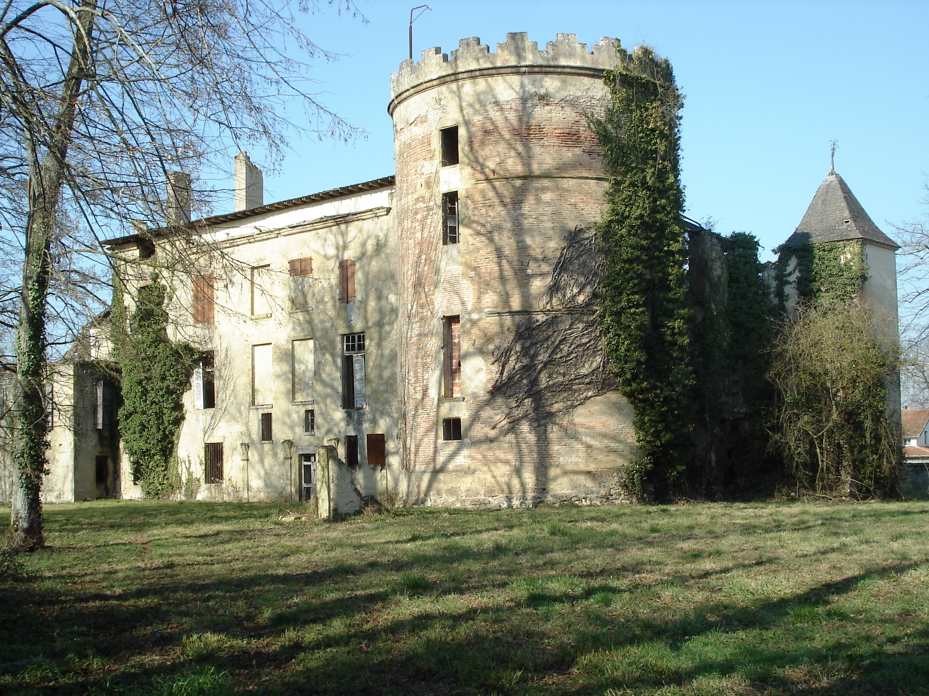 Chateau de Labatut-Rivière, Hautes-Pyrénées, France